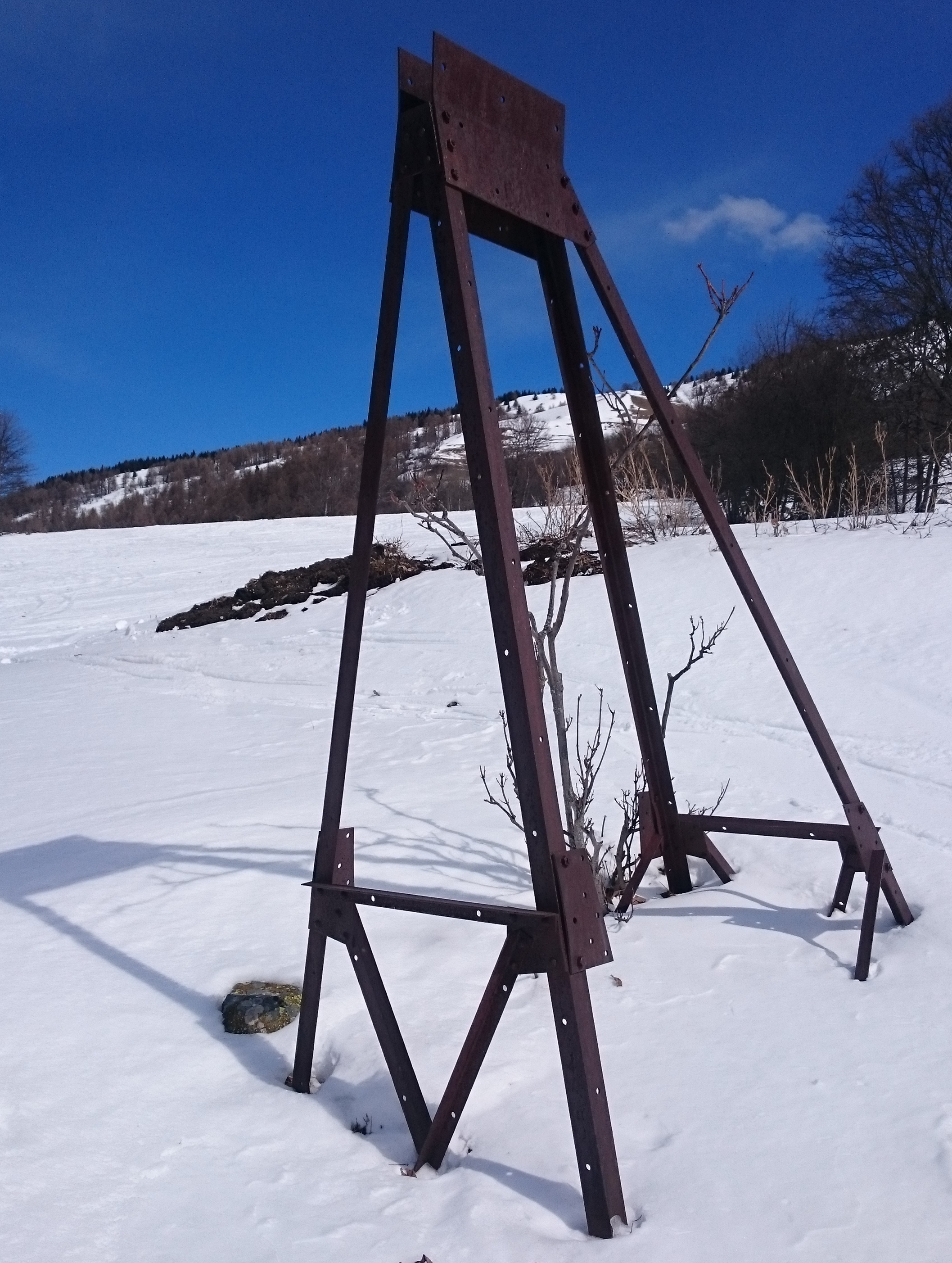 Le dernier vestige du remonte-pente de l'Epinette au hameau des Granges, construit en 1936 par Gabriel Julliard, premier remonte pente de Maurienne et un des tout premiers de France.